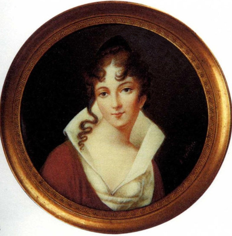 Портрет Натальи Ивановны Загряжской (1785-1848). Миниатюра